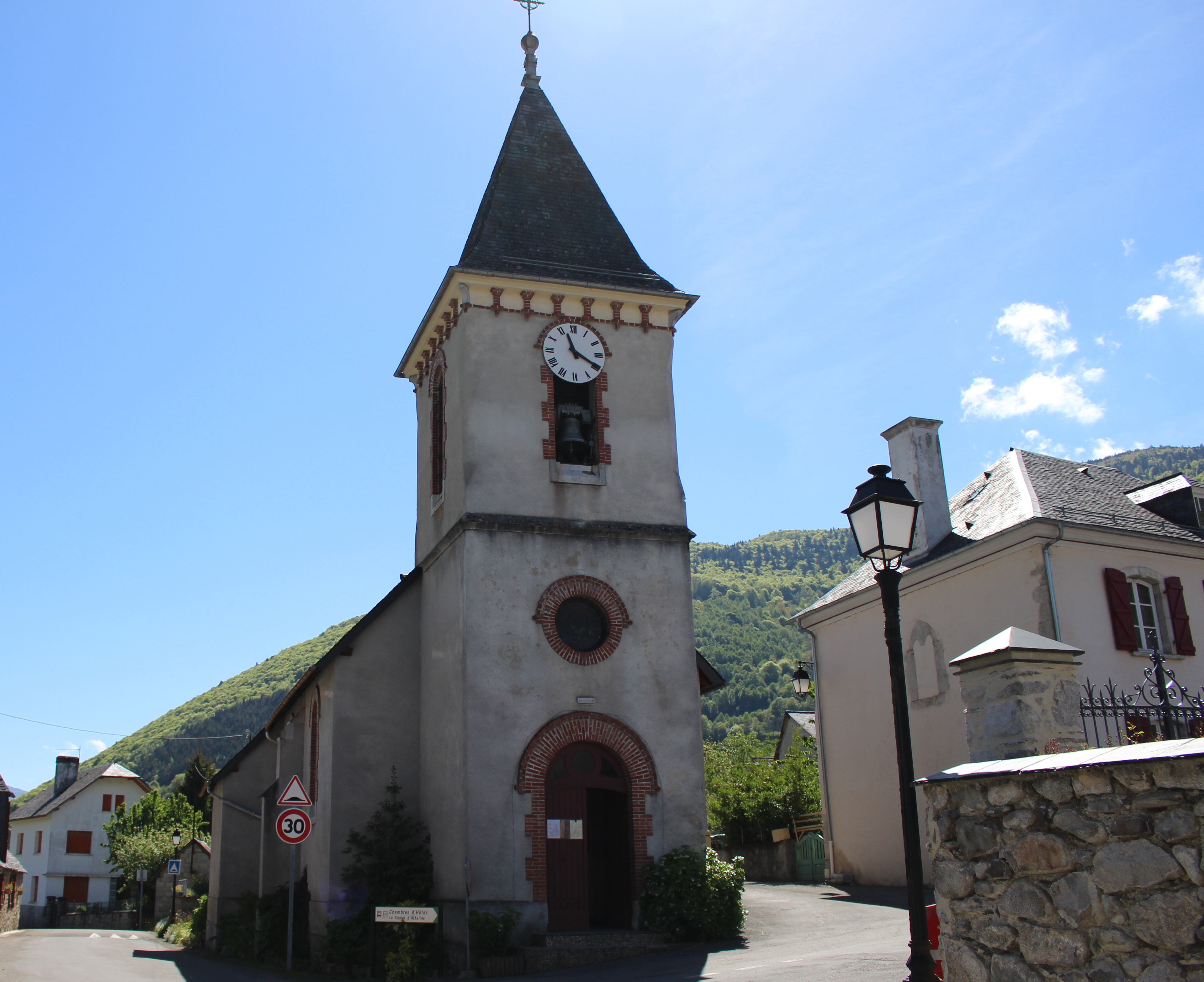 Église Saint-Martin de Bun (Hautes-Pyrénées)